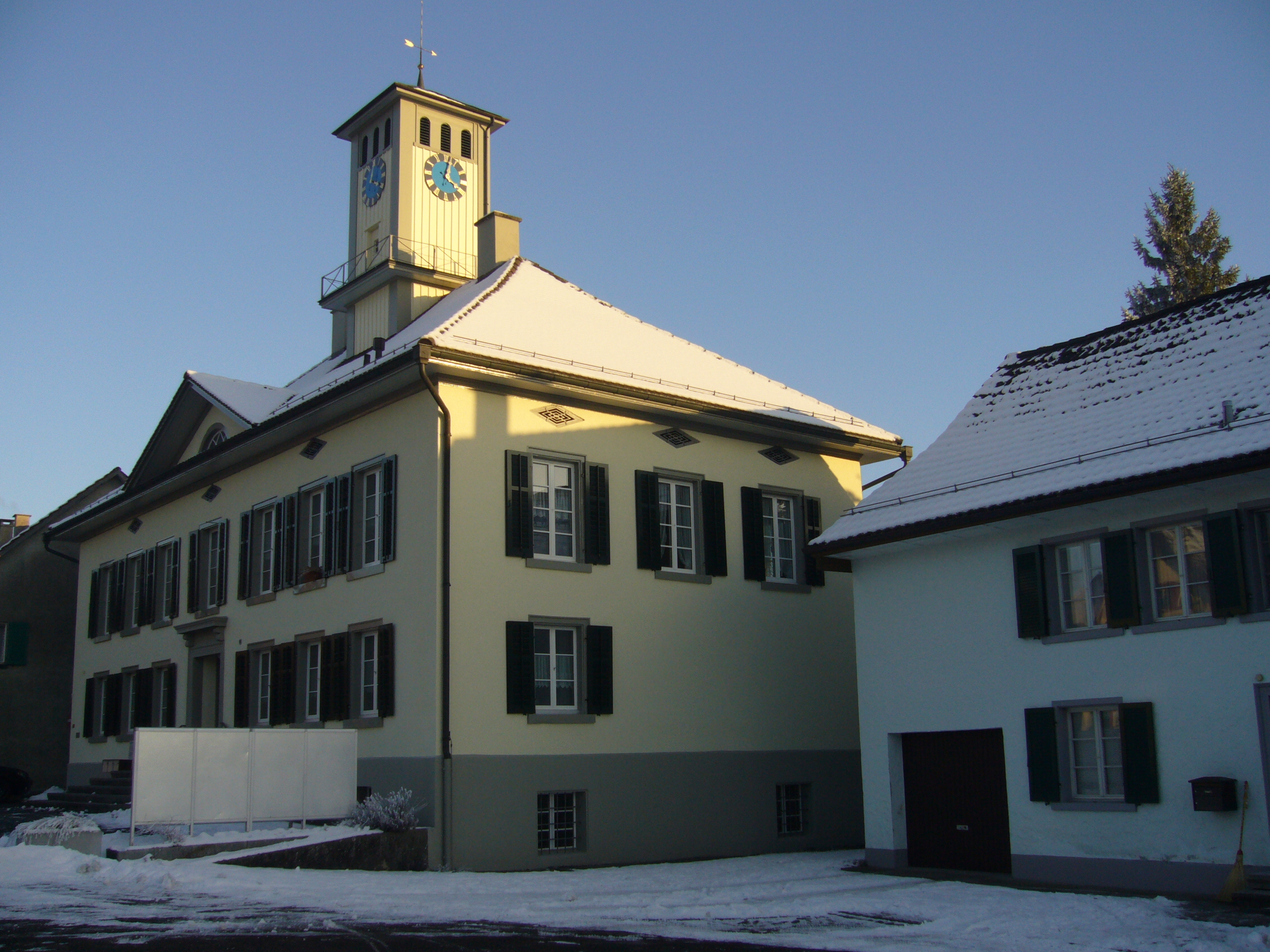 Gmeindkanzlei Thundorf.